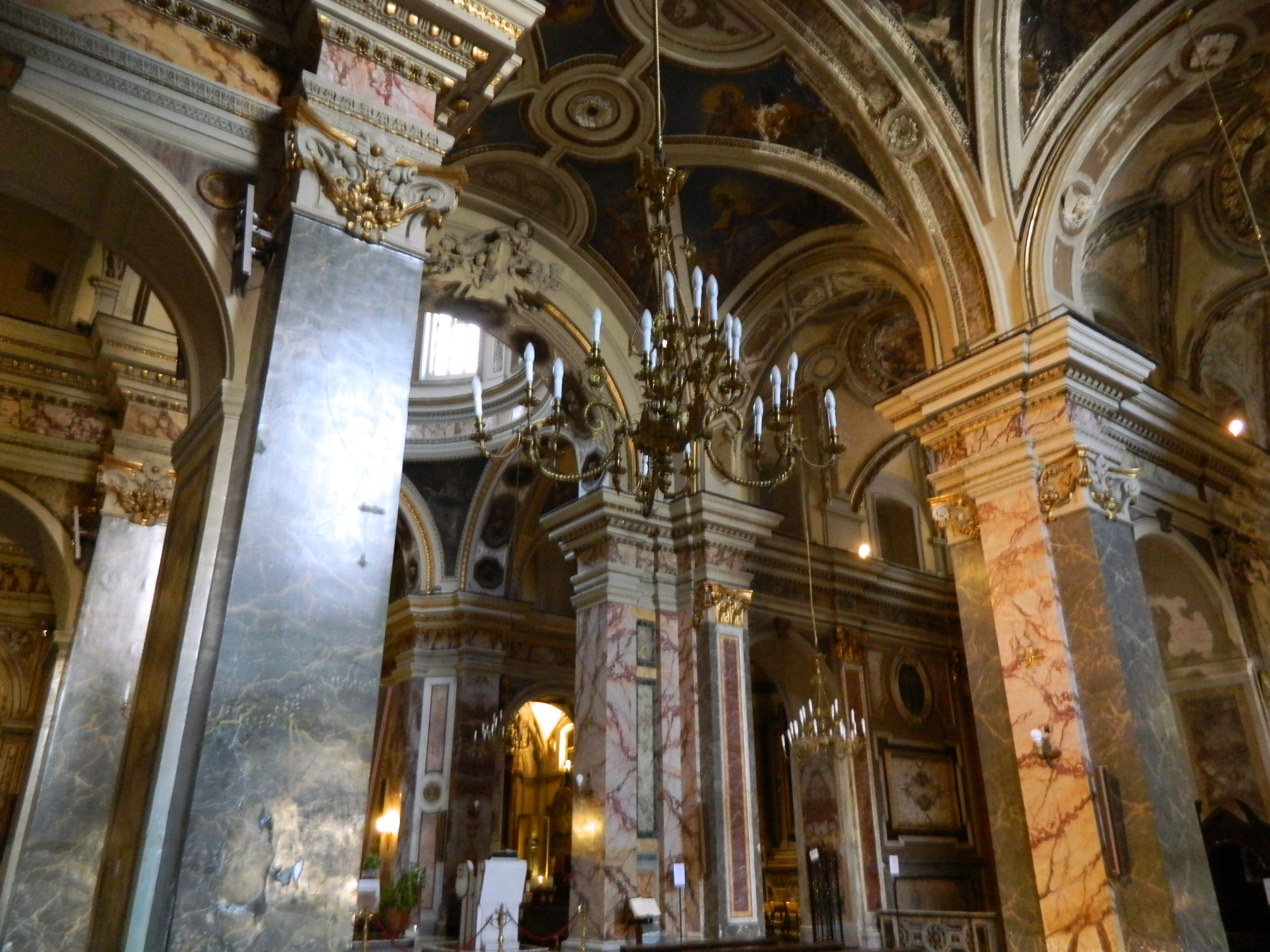 Chiesa di San Domenico Soriano (Napoli) - Particolare dell'interno